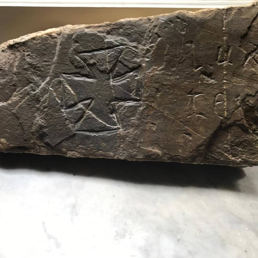 Frammento in pietra recante una Croce Patente di Fattura Templare e una incisione con le parole LUX e TEN